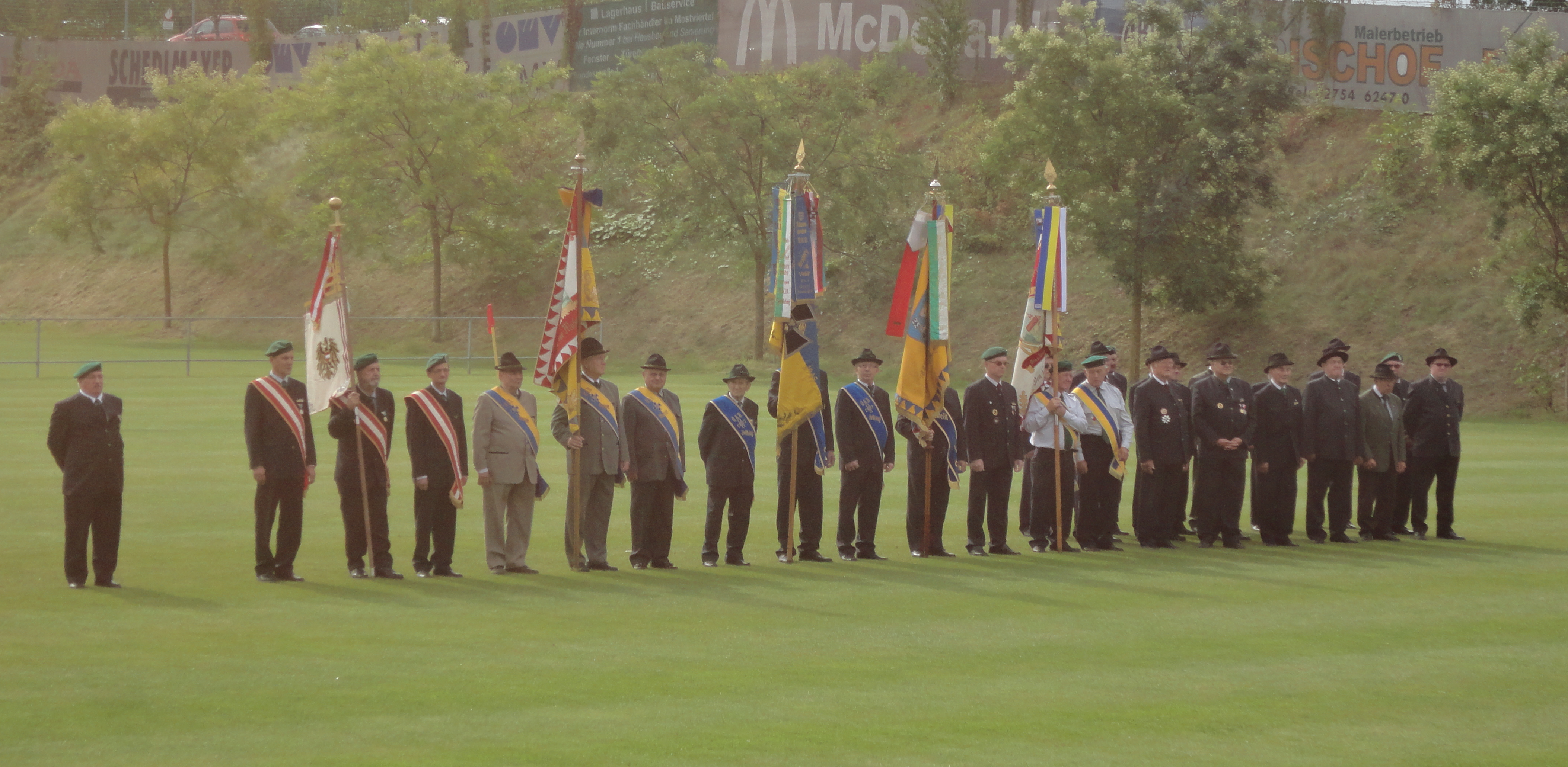 Eine Abordung des Österreichischen Kameradschaftsbundes bei einer Angelobung